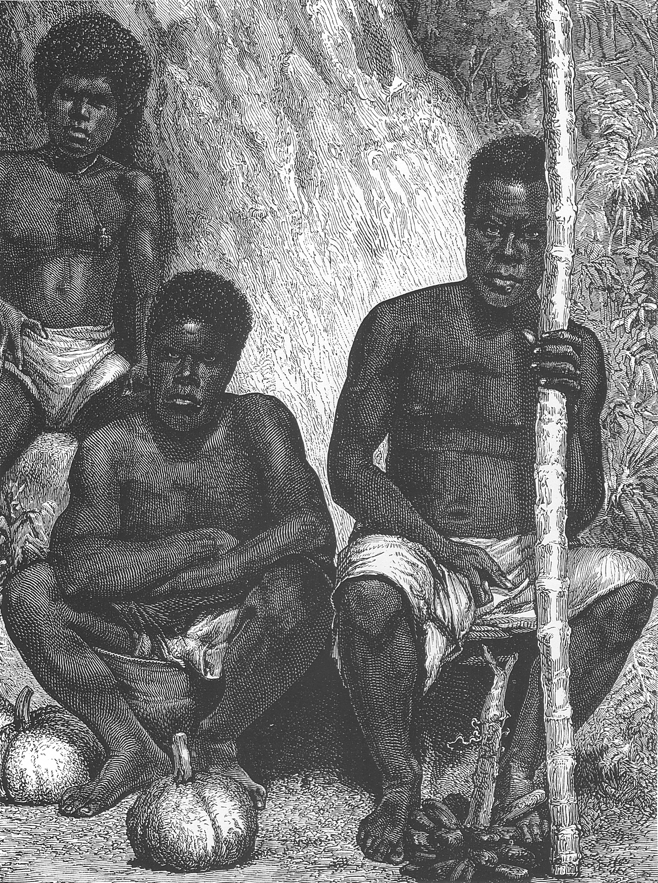 Indigènes de Nouvelle-Calédonie, vers 1880